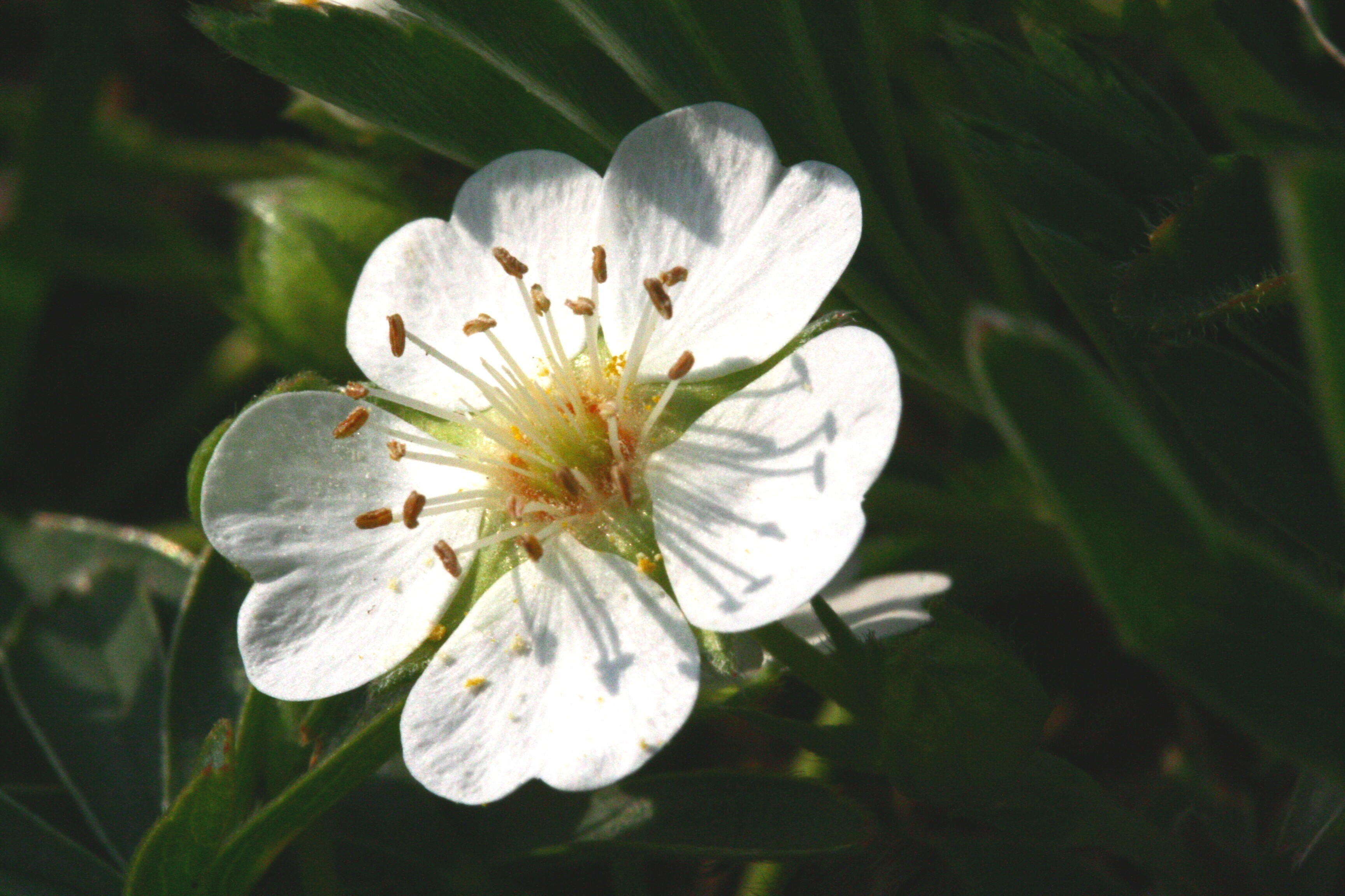 Potentilla_alba (Cinquefoglia bianca) Corlonch, Trichiana (BL), quota 580 m s.l.m.